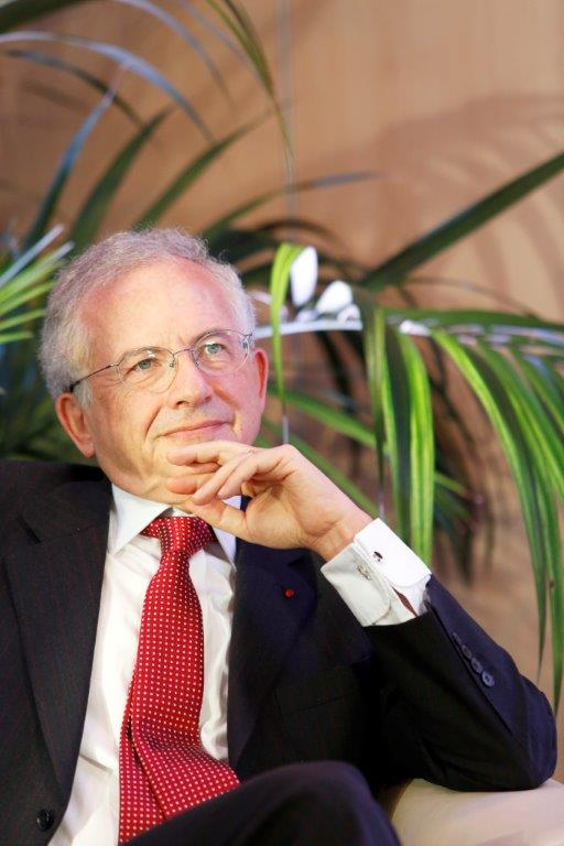 Olivier Schrameck